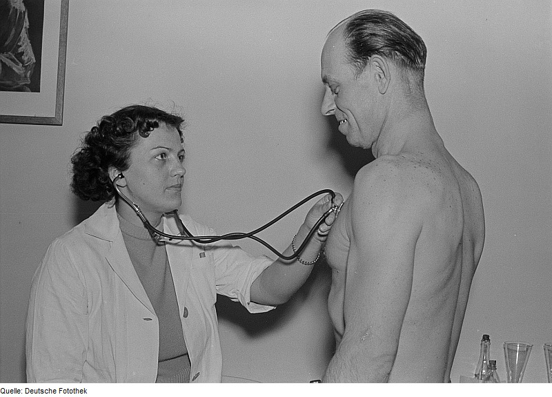 Original image description from the Deutsche Fotothek Ärztin bei der Behandlung eines Patienten